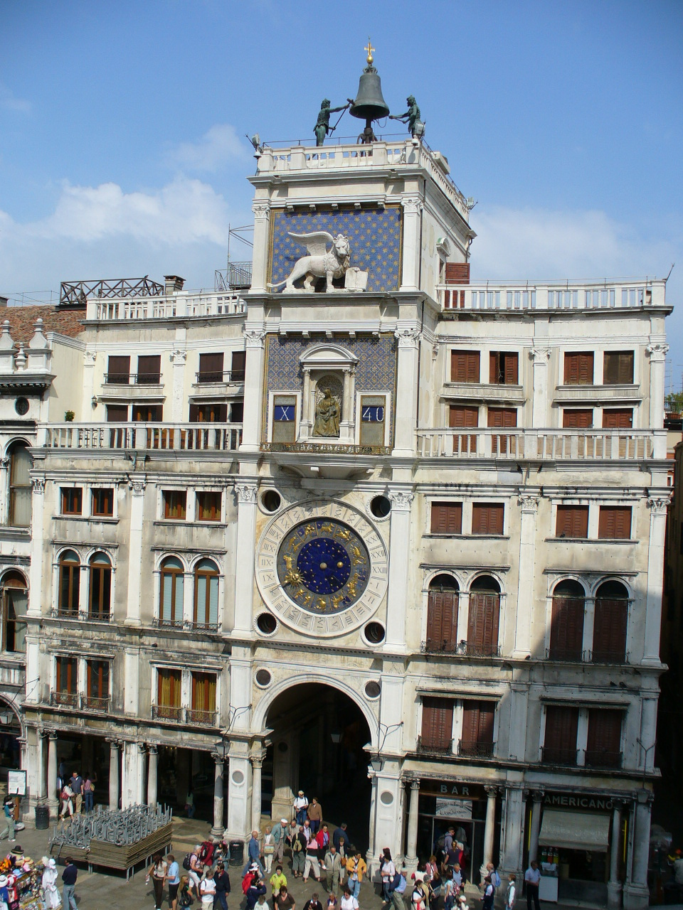 Construída entre 1496 e 1499, marca as horas, o dia e a fase lunar.